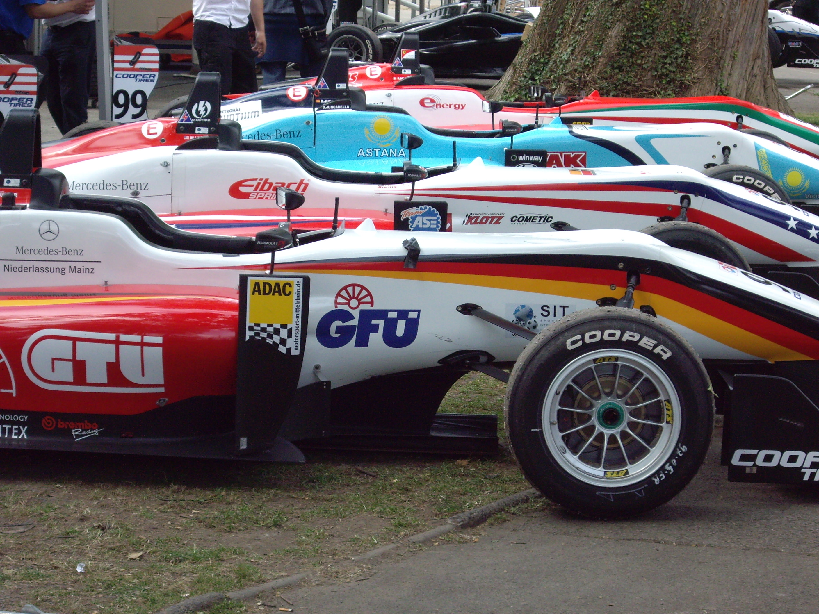 monoplaces de Formule 3 au Grand Prix de Pau 2012